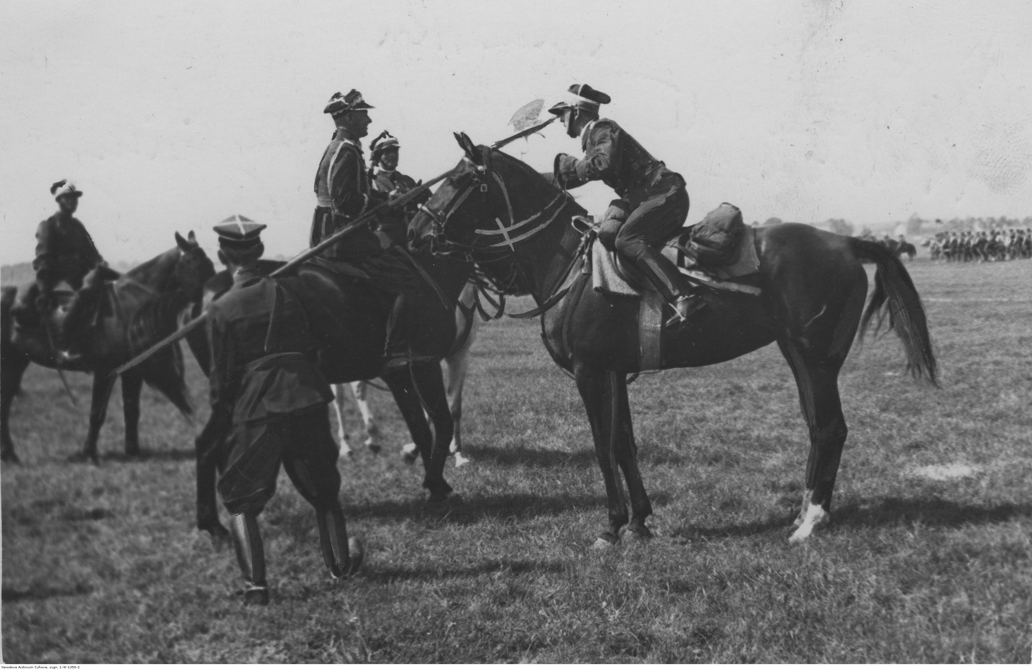 Rewia Brygady Kawalerii "Baranowicze" w Lidzie. Gen. Edward Rydz-Śmigły (3. z prawej) w otoczeniu nierozpoznanych oficerów podczas rewii. Koncern Ilustrowany Kurier Codzienny - Archiwum Ilustracji. Sygnatura: 1-W-1350-2